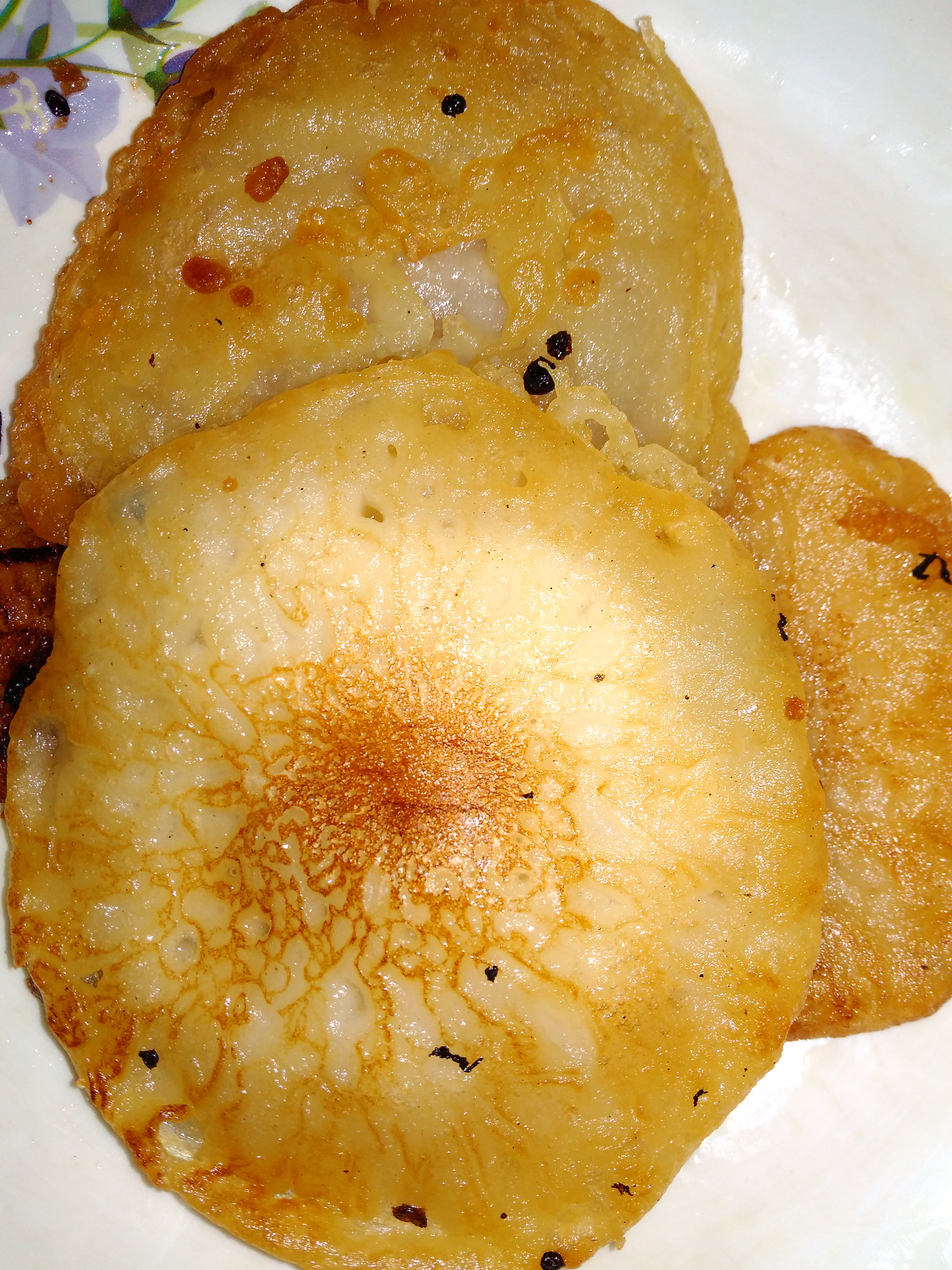 পিঠাটি পান পিঠা, পাকান পিঠা, পোয়া পিঠা, মালপোয়া ইত্যাদি নামে বাংলাদেশ ও ভারতে পরিচিত।